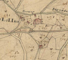 La Llau, del Tec, en el Cadastre napoleònic del 1812 (Arxius Departamentals dels Pirineus Orientals)